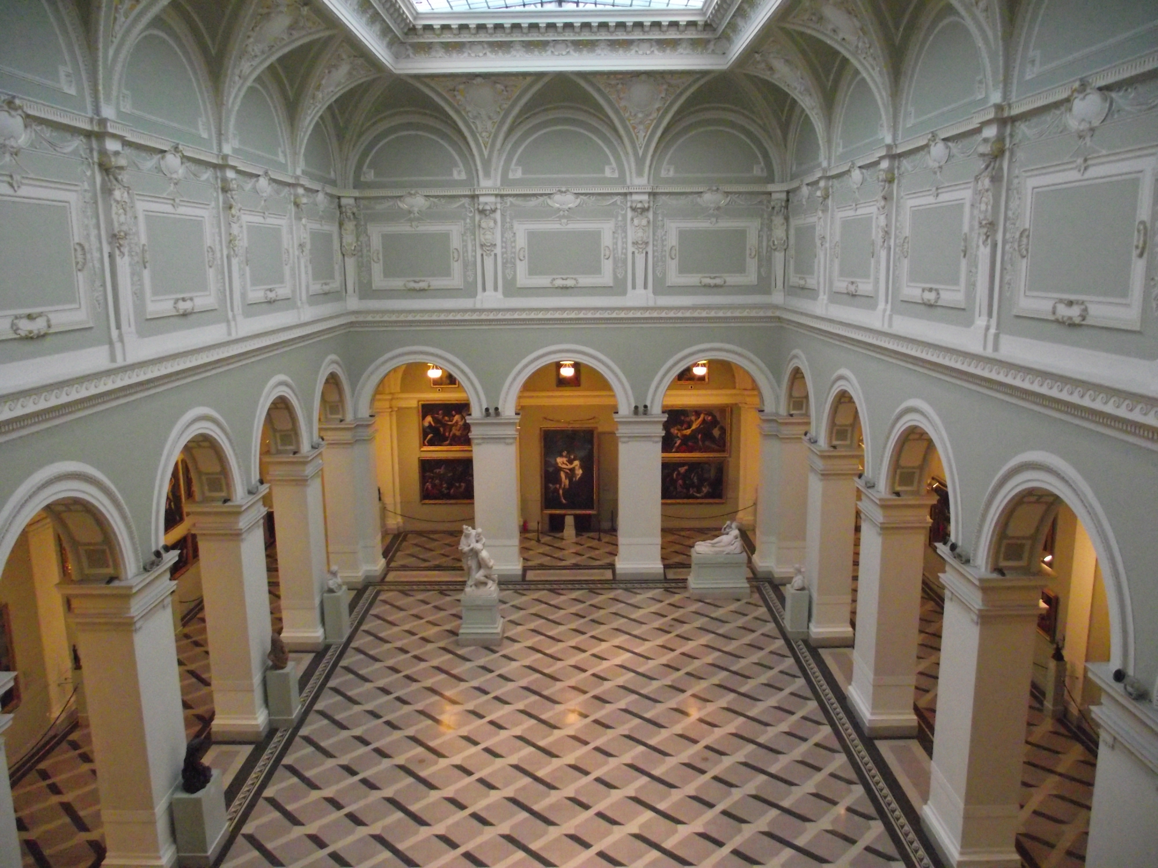 lásd a címet